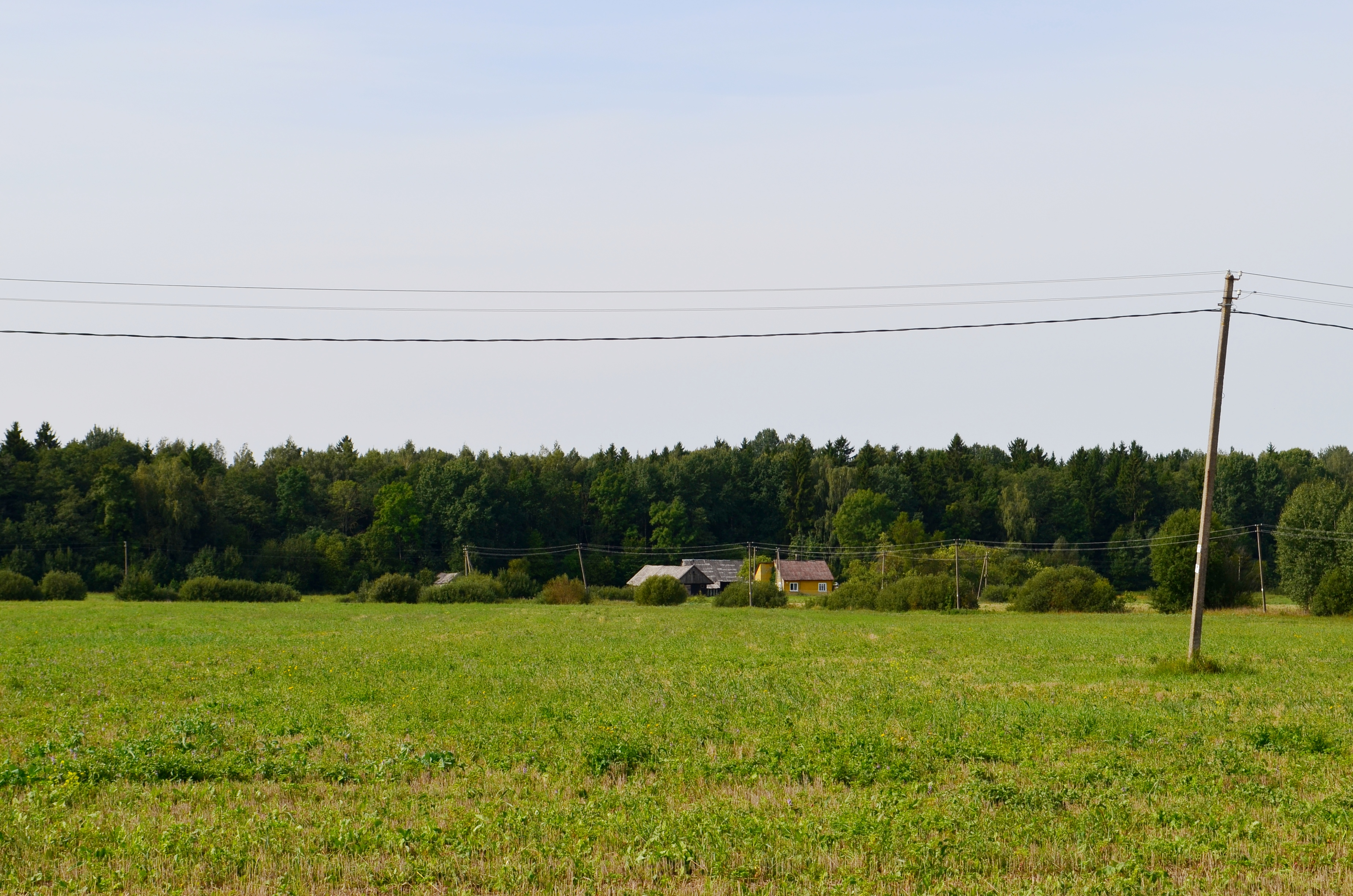 Jiestrakis, Prienų raj.